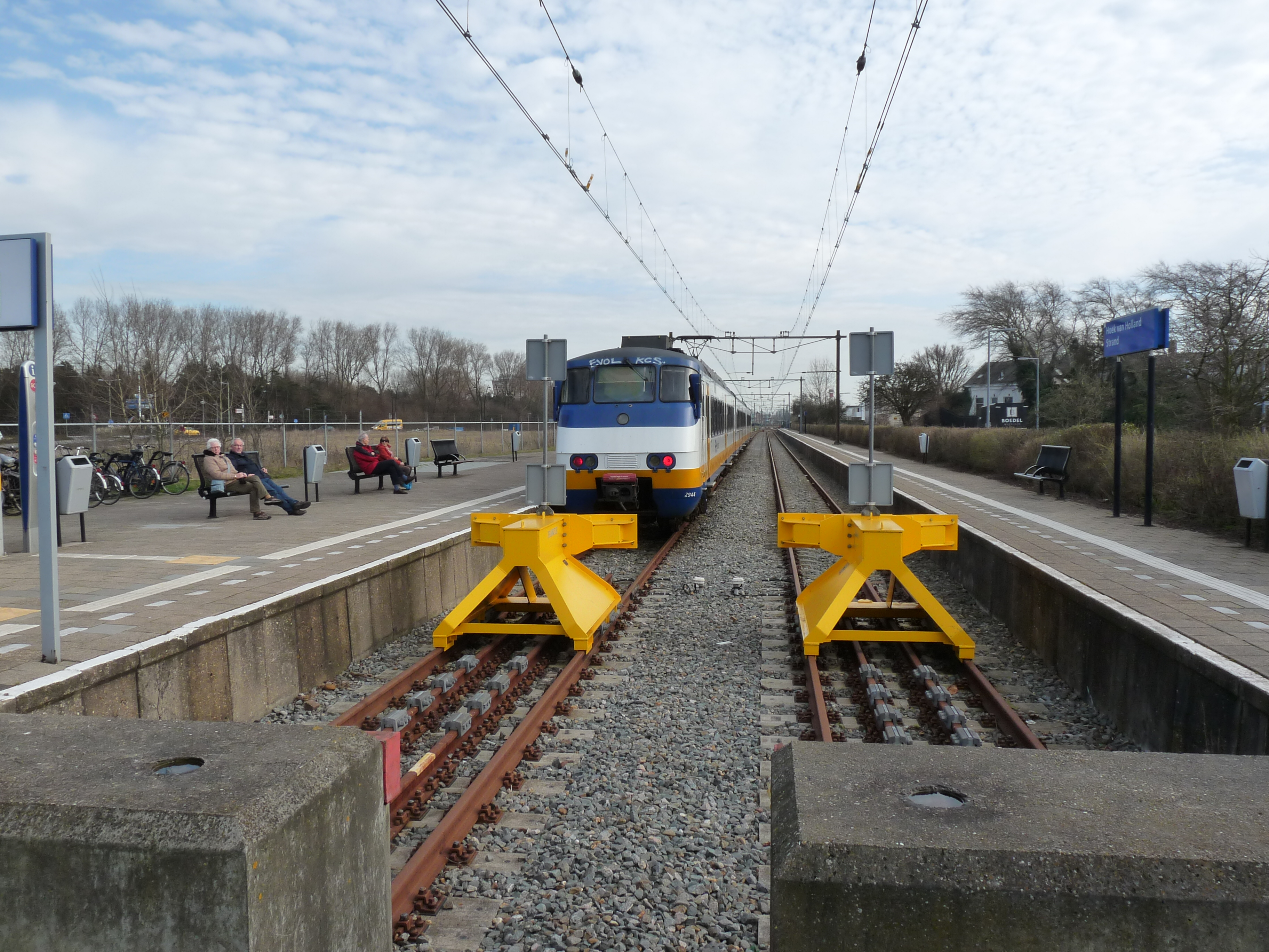 Het station Hoek-van-Holland-Strand de laatste maand